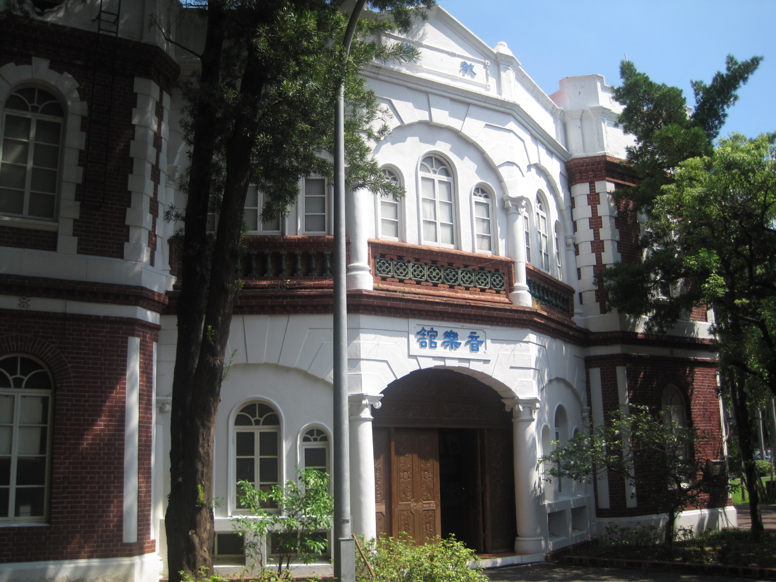 長榮中學教堂